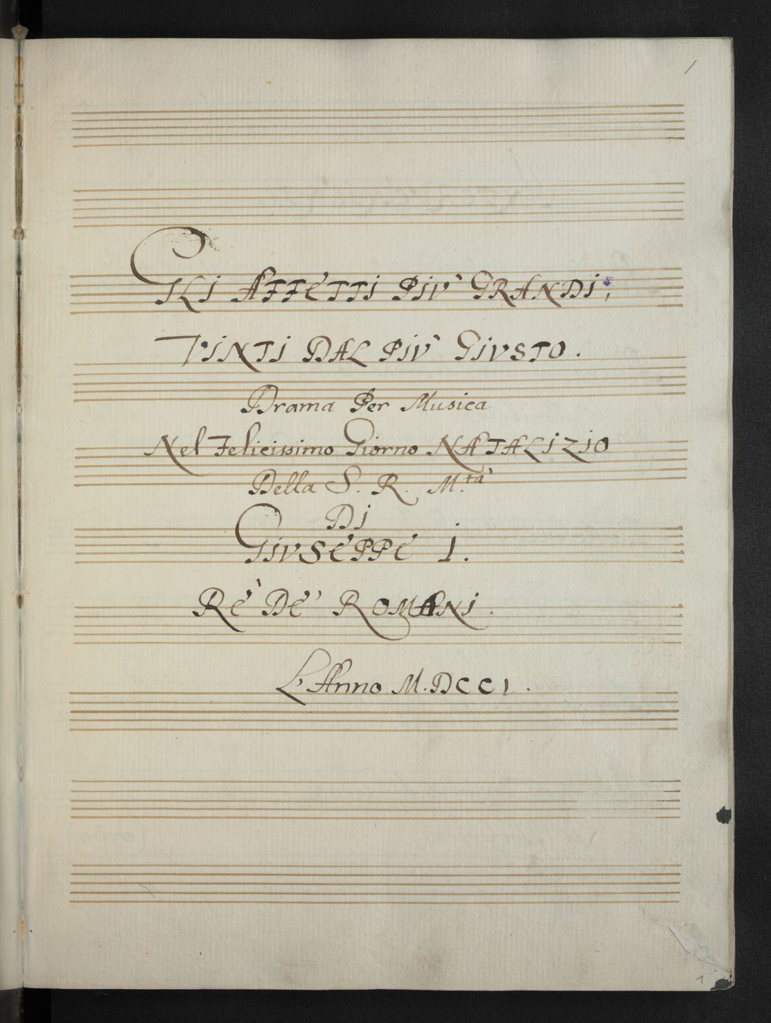 Portada de la ópera Gli affetti più grandi vinti dal più giusto, en los archivos de la ONB